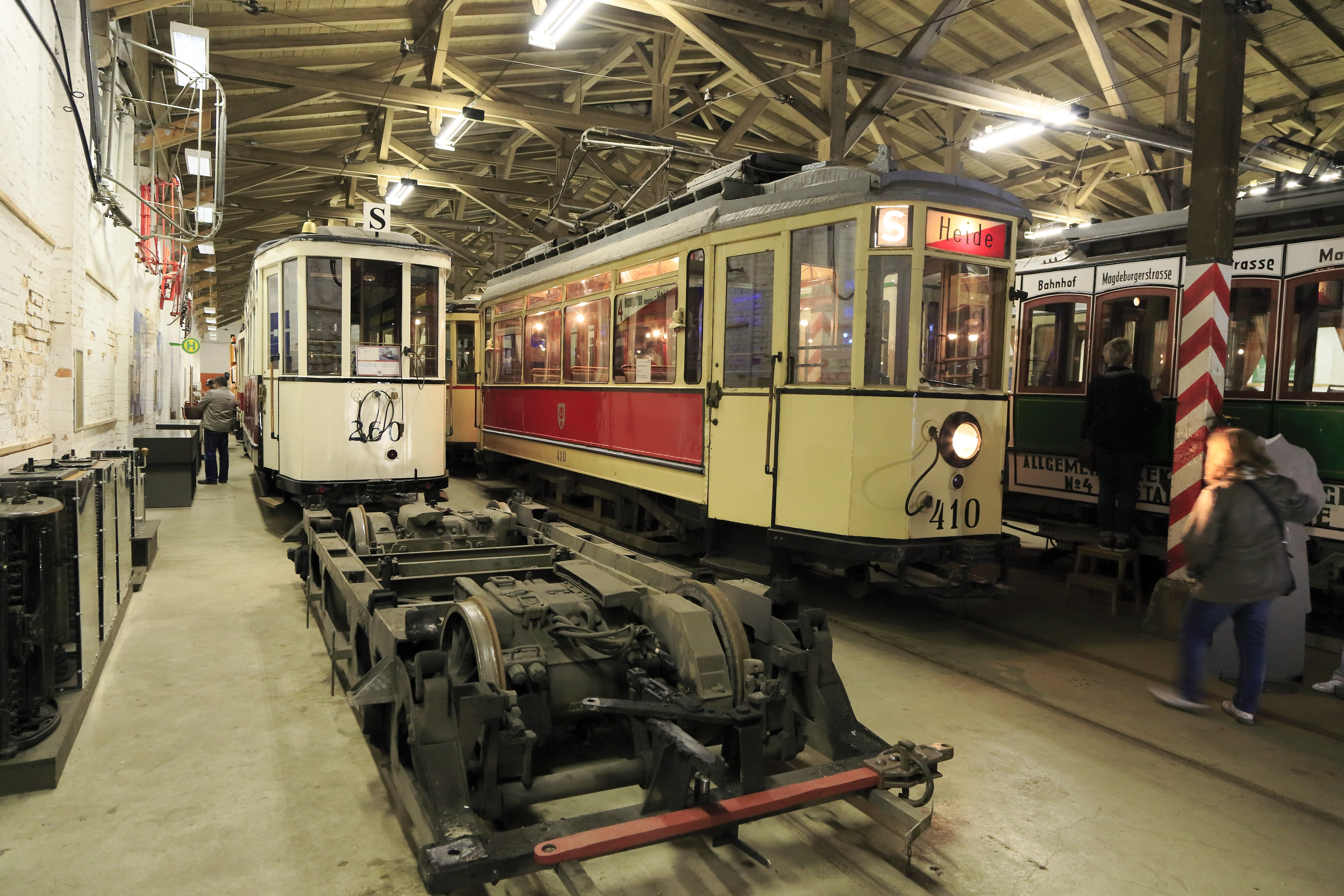 Einer der typischen »Lindner«-Triebwagen von 1928, die elektrische Ausrüstung stammt von SSW. Im Vergleich zu den wenige Jahre älteren Wagen der Leipziger Typen 22 und 56 wirken die Lindner-Wagen schon im Lieferzustand deutlich moderner. Maße und Aufbau sind jedoch sehr ähnlich. Druckluftbremsen waren in Halle nicht üblich, die gestrichene Zielbeschilderung entstand aufgrund eines Irrtumes. Der Wagen ist zum Aufnahmezeitpunkt betriebsfähig, aber wegen Fristablauf abgestellt. Der äußerlich ähnliche Beiwagen 260 links daneben wurde 1926 von Christoph und Unmack in Niesky gebaut, das Laufgestell im Vordergrund gehört zum Erfurter Wagen 6, der über die Kirnitzschtal- und Lockwitzgrundbahn nach Halle gelangte.